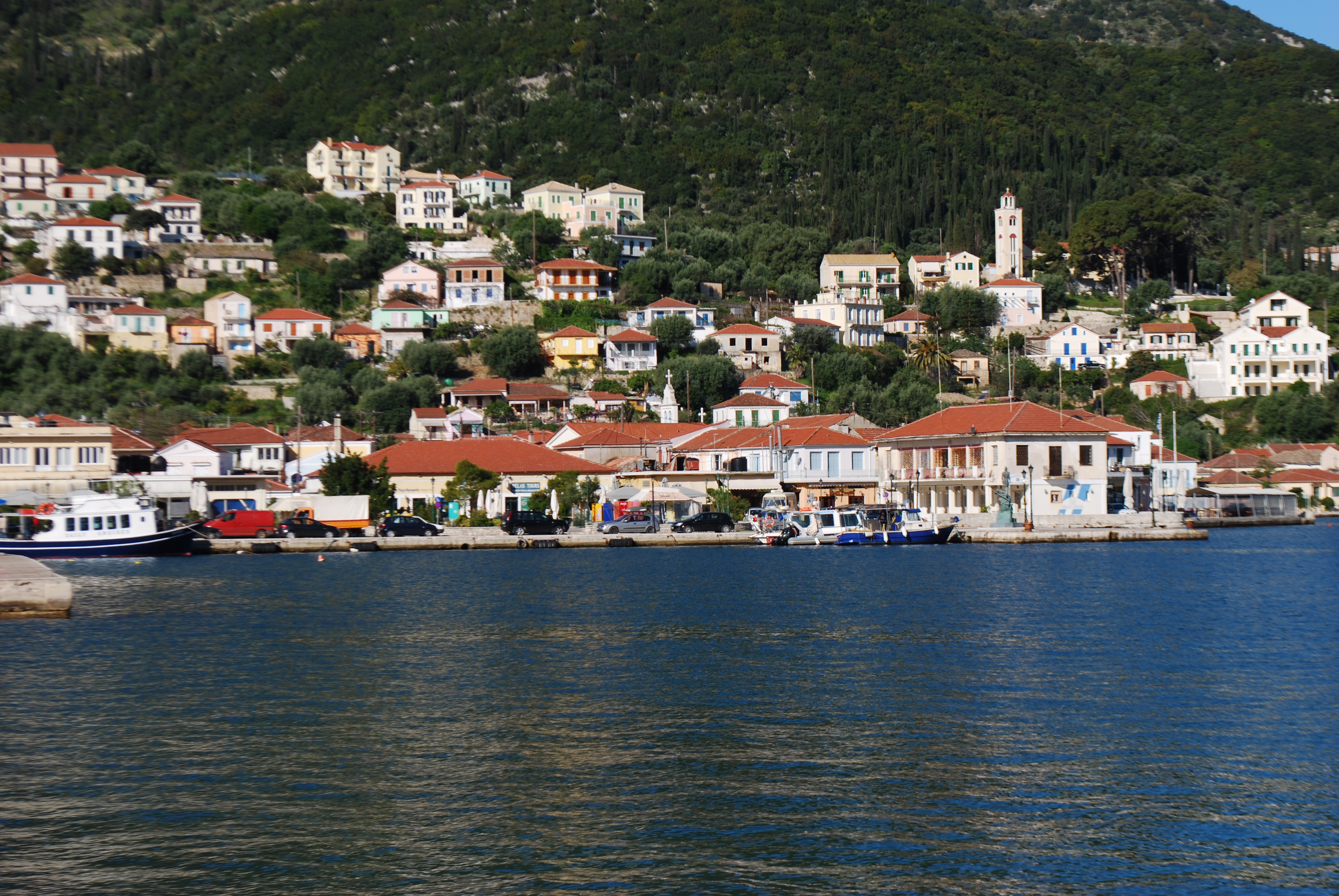 Vue d'Ithaque.